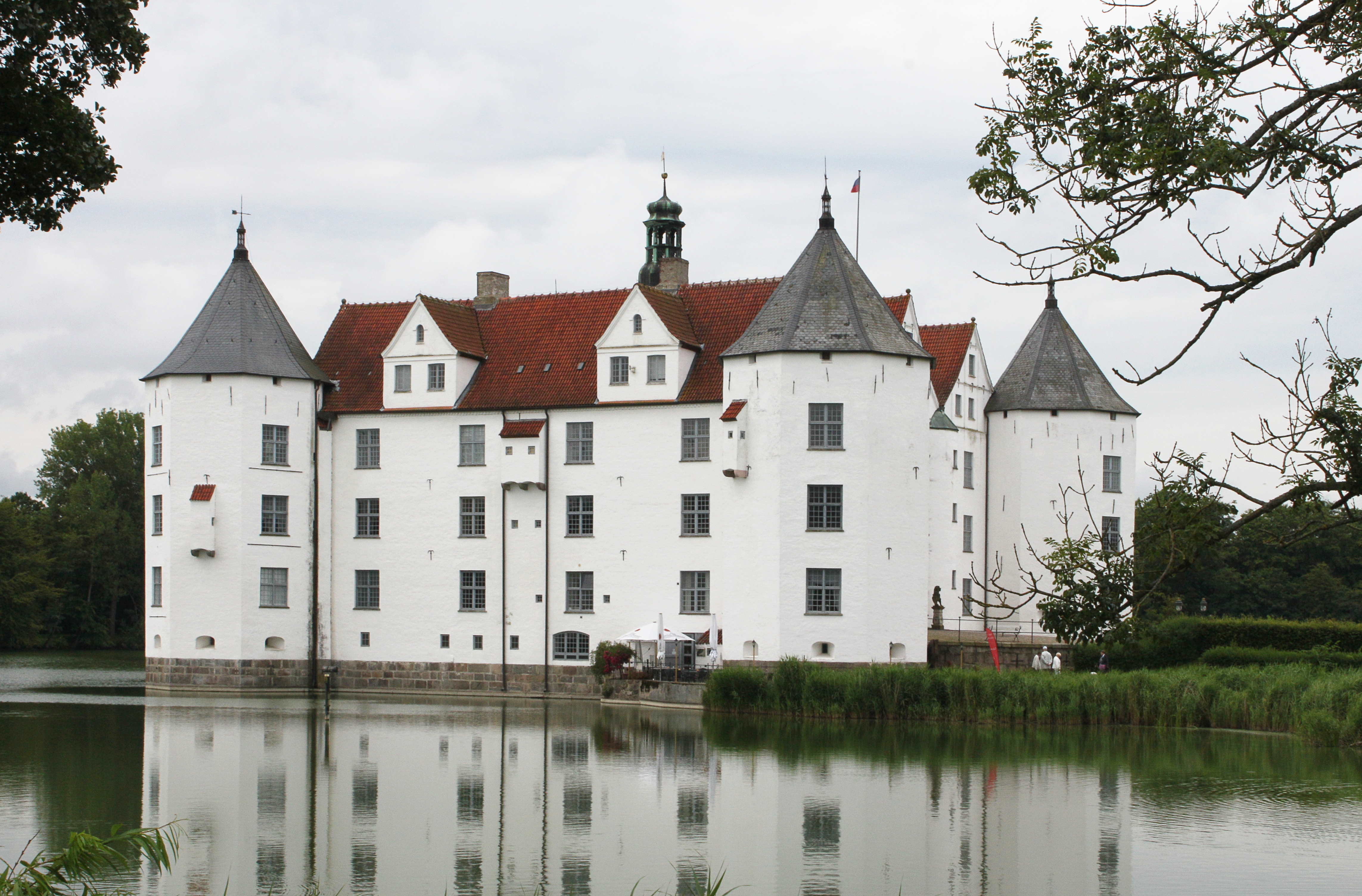 Glücksburg Wasserschloss